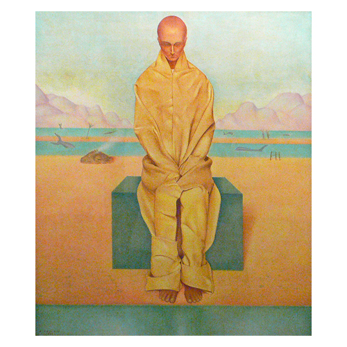 L'ESILIATO